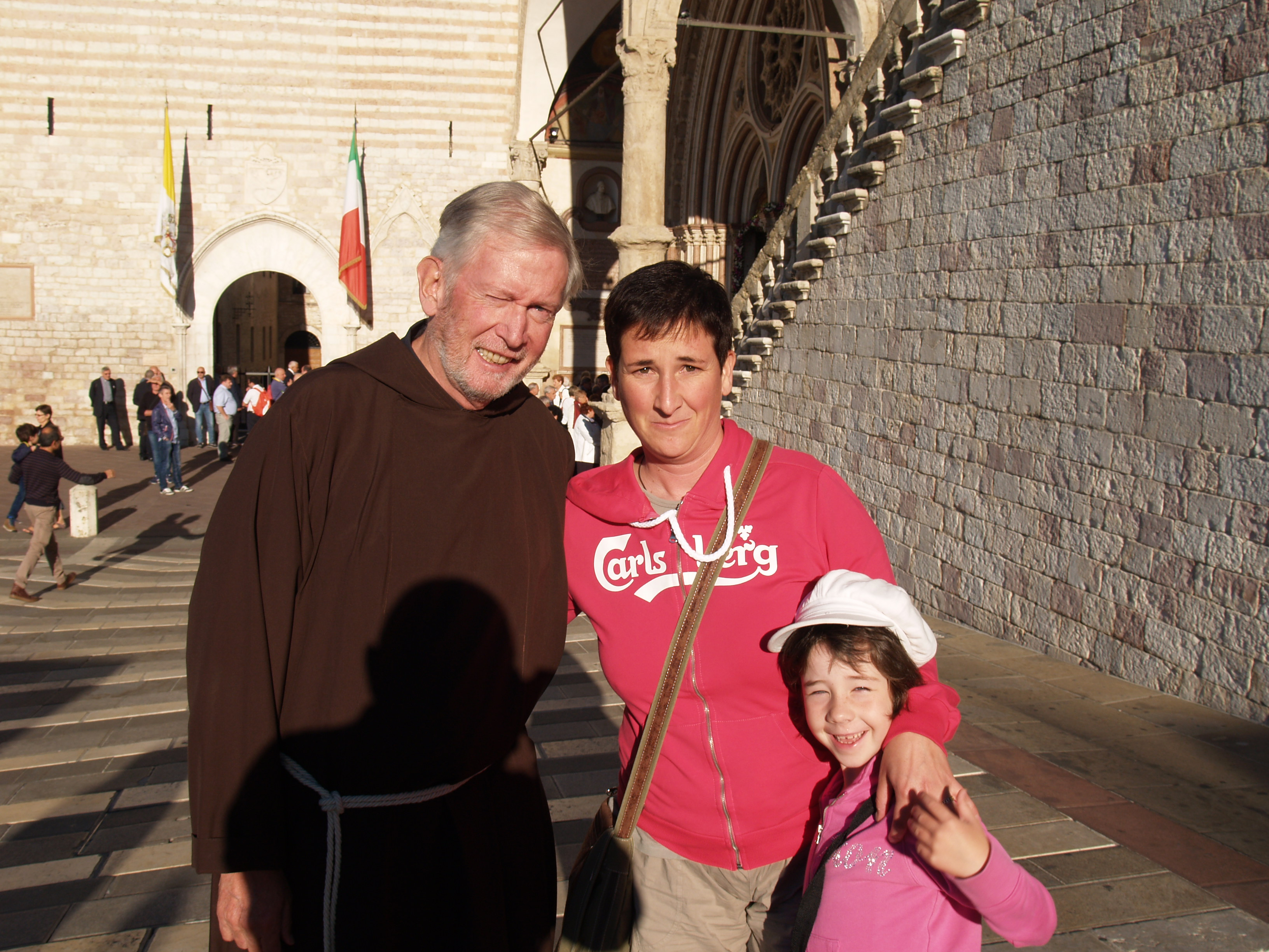 Assisi, 2016. Foto ricordo di Samantha palazzi con p. Mauro Jöhri OFM Capp.